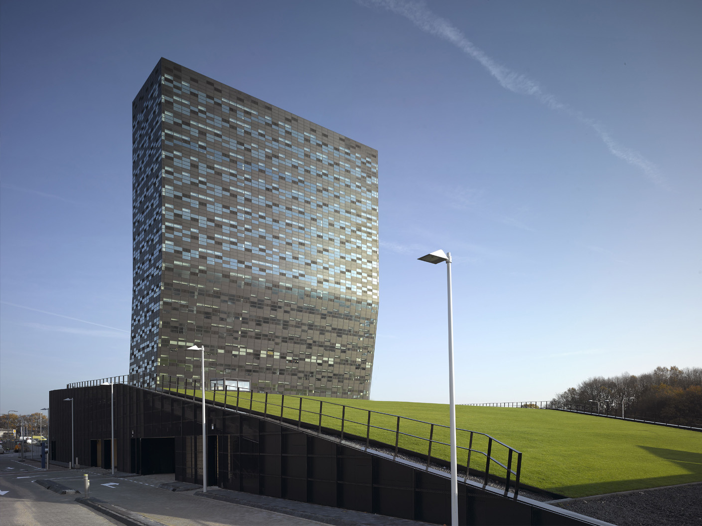 Centro de Inovação Empresarial da Philips, conhecido como Fiftytwodegrees em Nijmegen, Holanda.